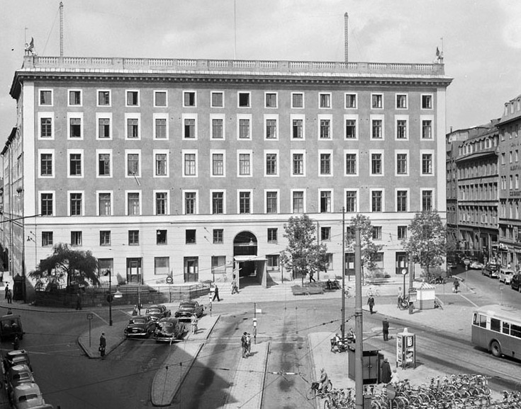 Brunkebergstorg 2, nyrestaurerade Telegrafhuset. Vy över torgets norra del , Fotonummer SvD 21187